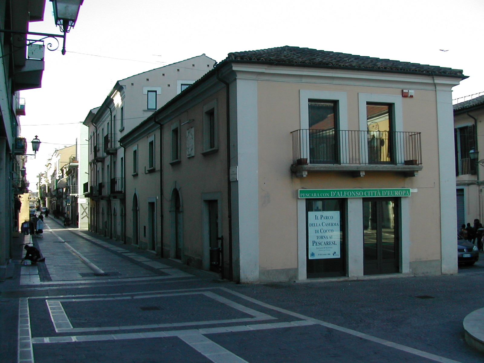 Pescara_Centro storico